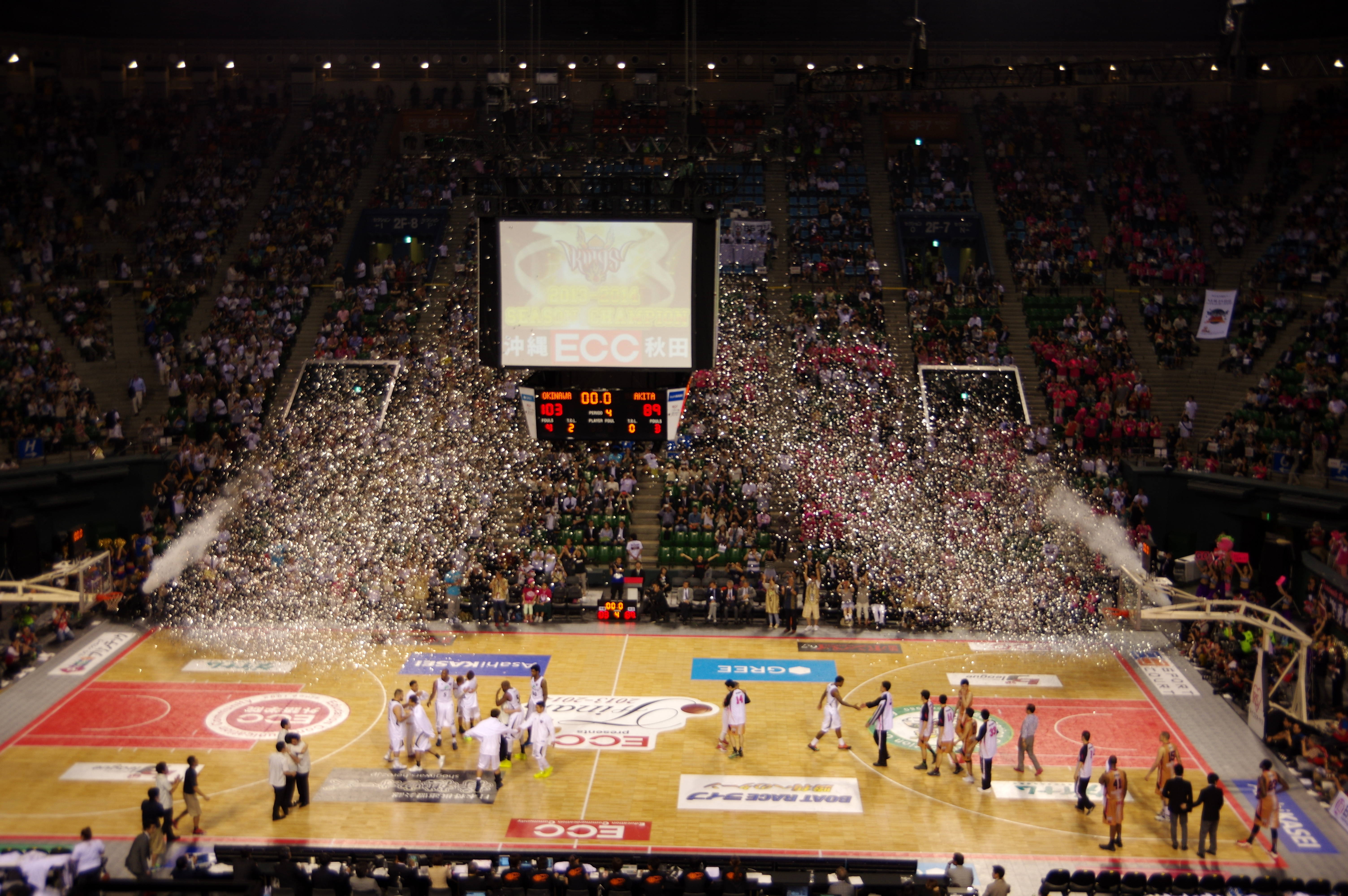 琉球対秋田